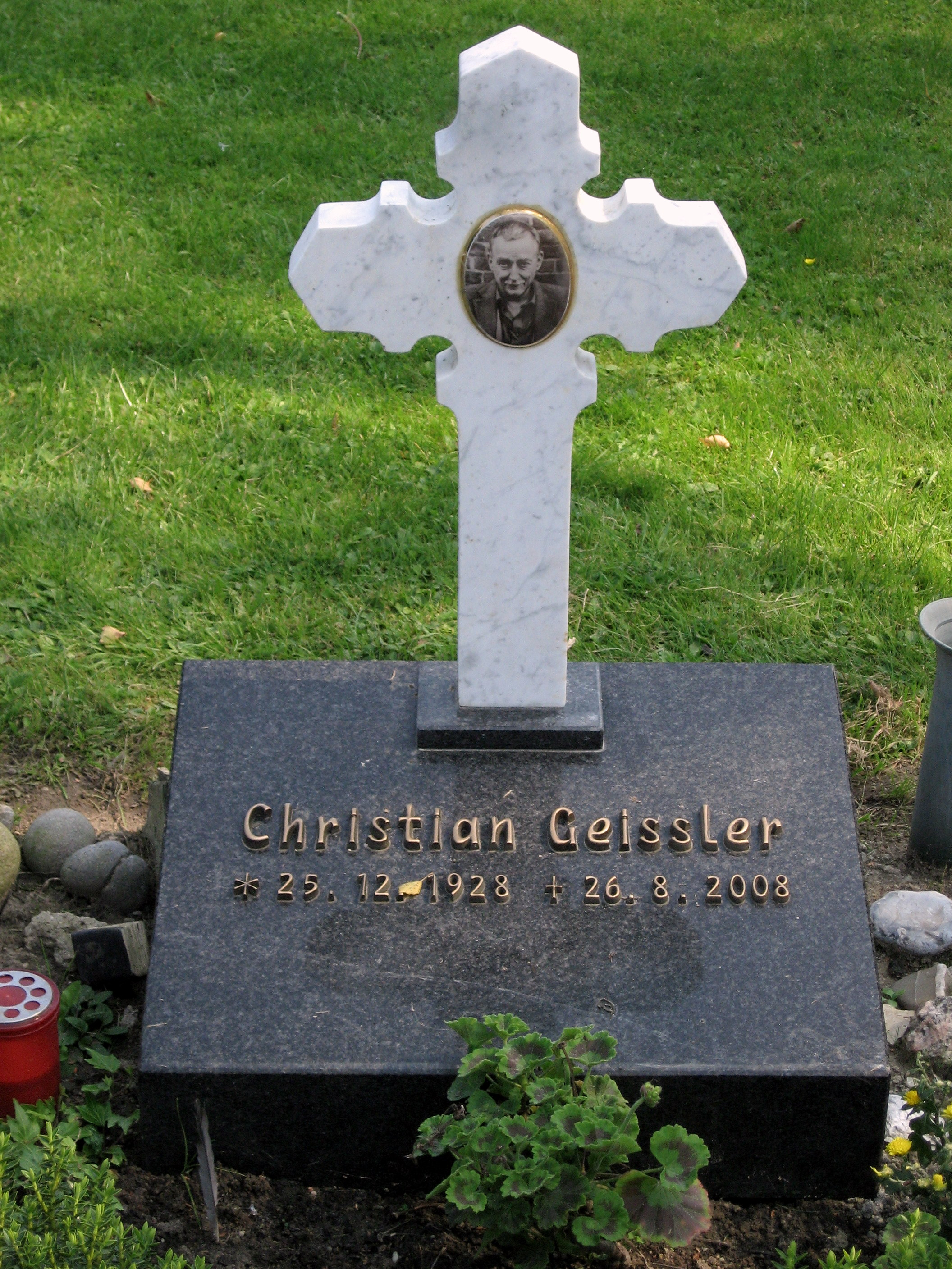 Grabstelle des Schriftstellers Christian Geissler auf dem Friedhof der Reformierten Kirche in Ditzumerverlaat im Rheiderland (Ostfriesland). Inschrift: Christian Geissler * 25.12.1928, † 26.08.2008. Die Geschichte der Grabstelle Christian Geisslers beschreibt die Schriftstellerin Sabine Peters in ihrem Roman "Feuerfreund", Wallstein Verlag, 2010